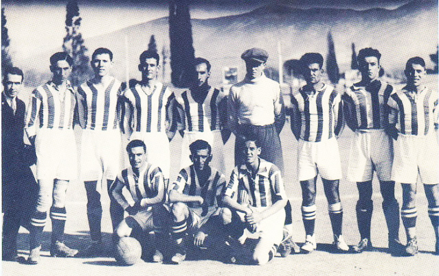 Η ομάδα του Απόλλωνα Σμύρνης το 1924